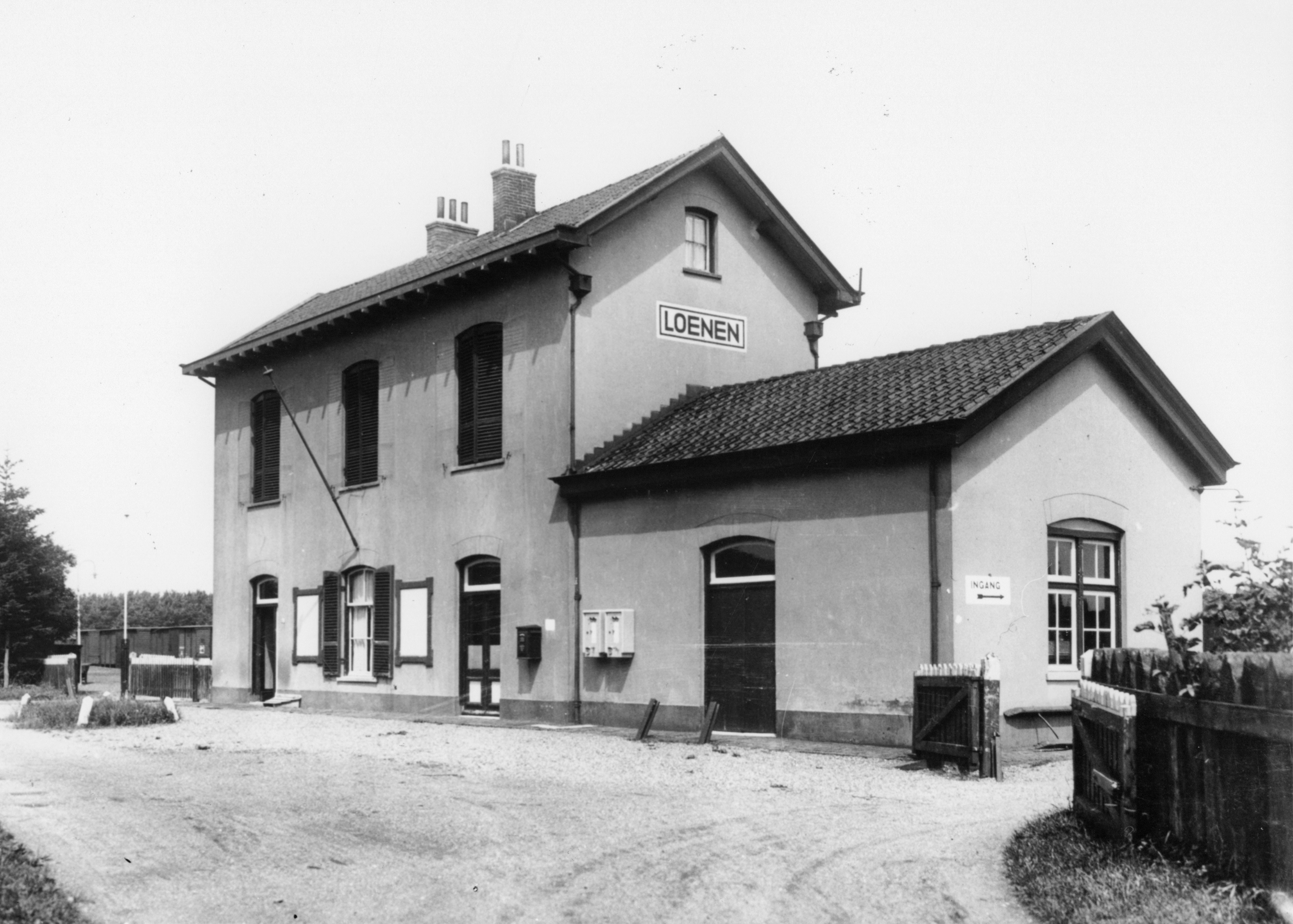 Gezicht op het N.S.-station Loenen te Loenen.